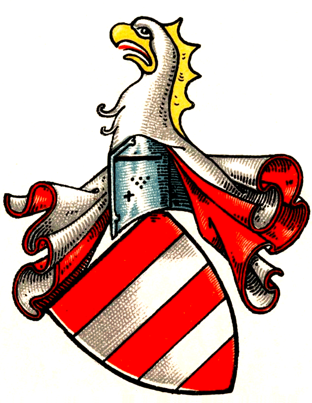 Wappen der Wolff von Gudenberg